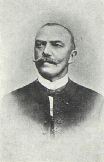 Tomáš Janovec (1868- ?), rakouský a český politik